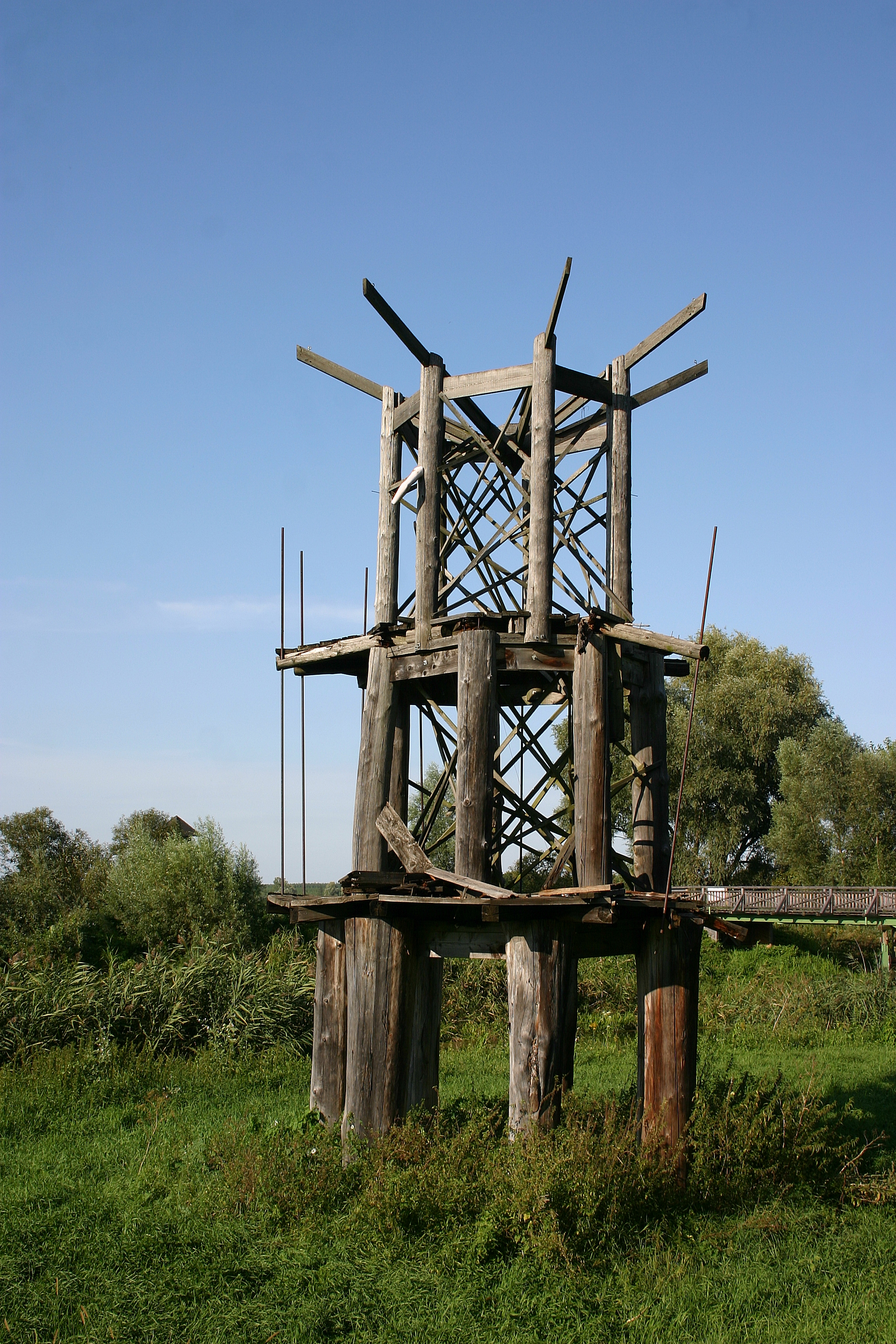 Brücke von Andau – verfallenes Mahnmal auf ungarischer Seite, Originalschauplatz für den Film Der Bockerer III